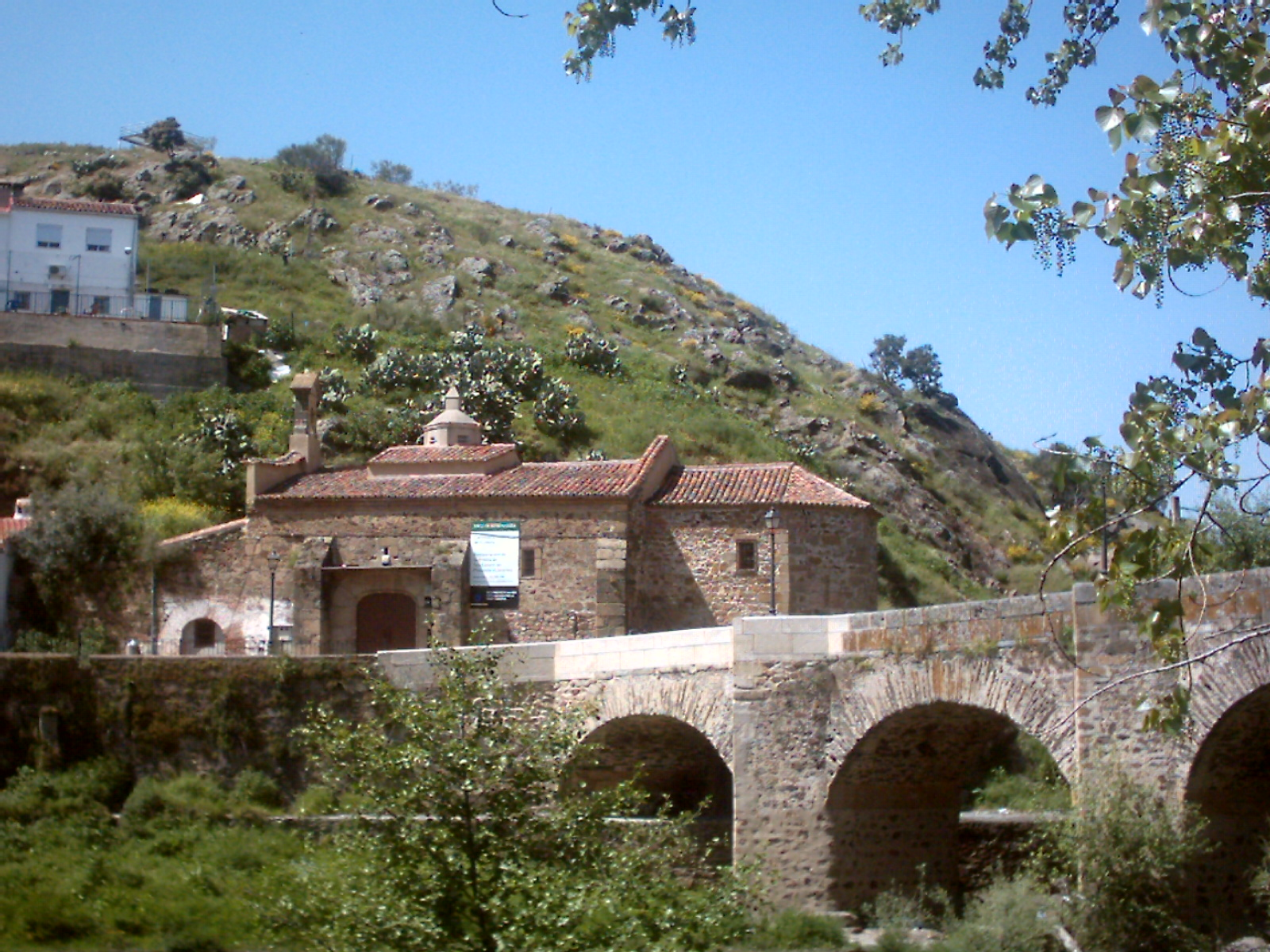 Ermita de San Lázaro en Plasencia, España